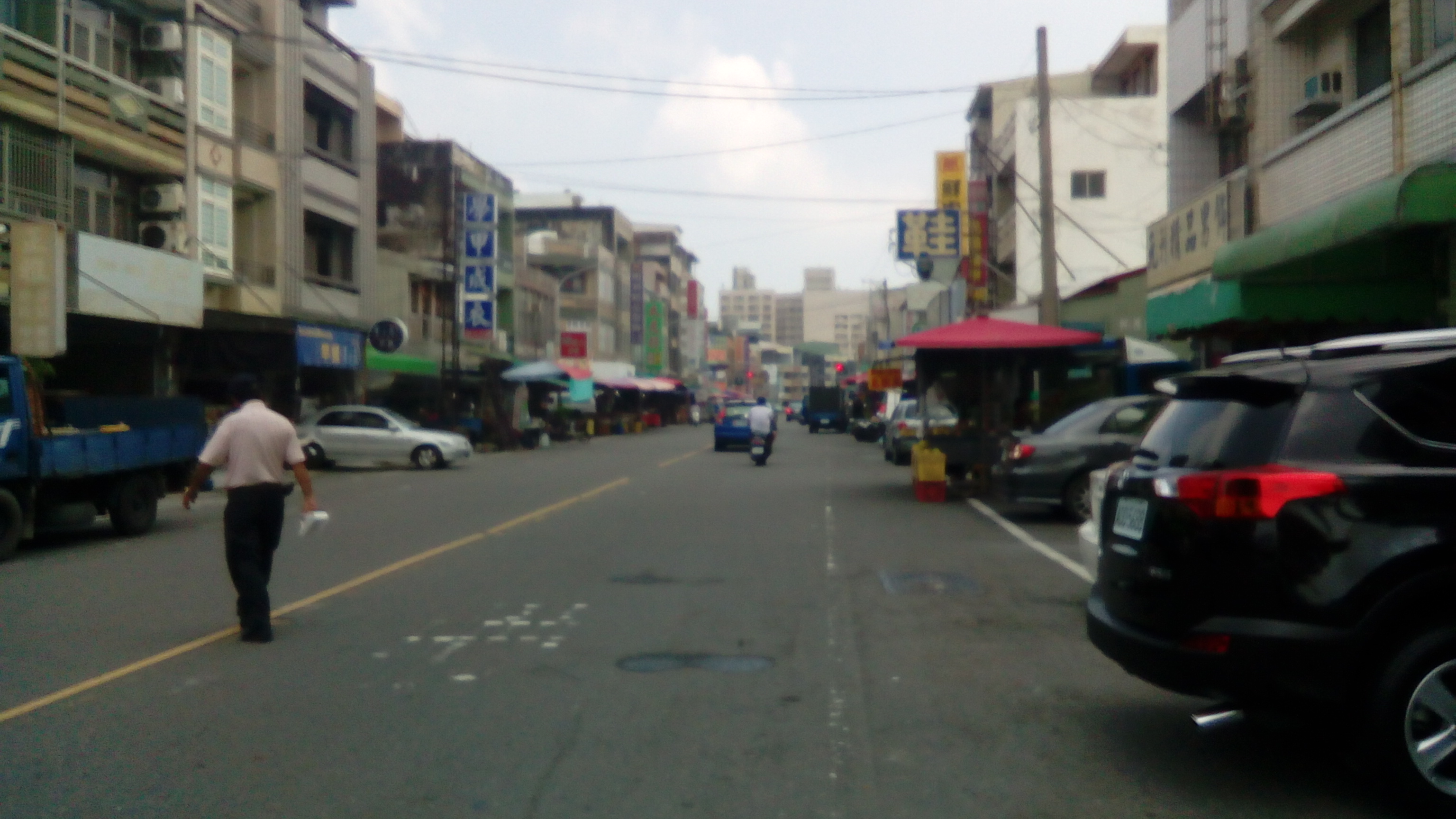 同上